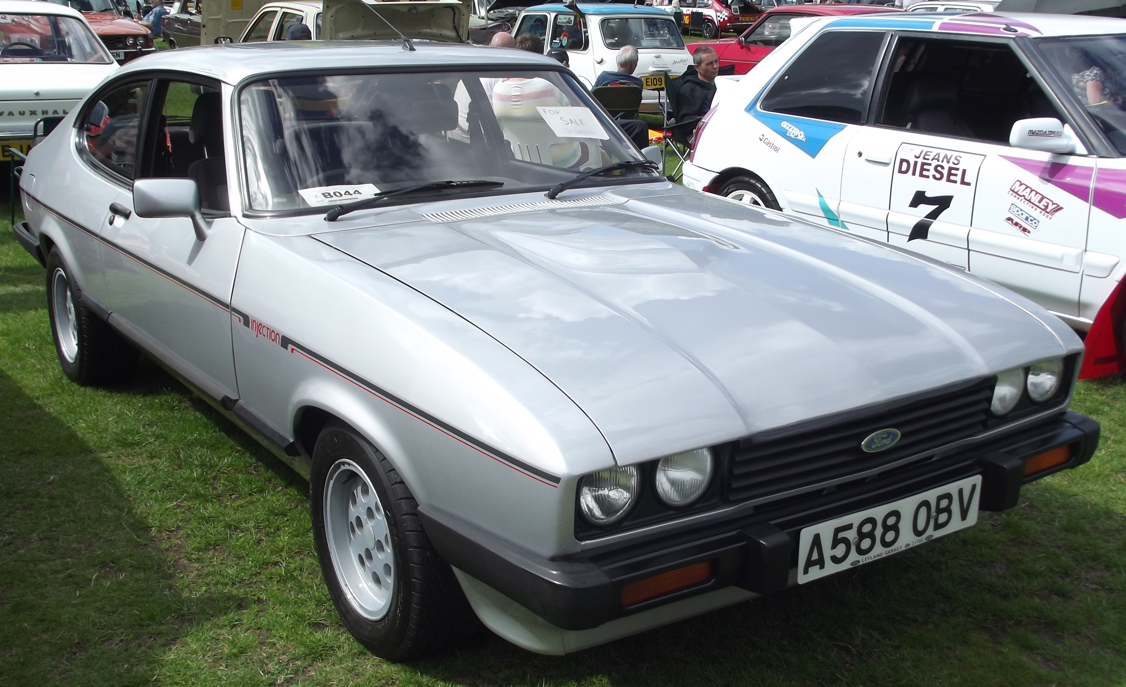 Ford Capri V6